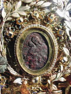 Рэльефны абразок Жыровіцкай Маці боскай ХV ст. Абклад ХVІІ-ХVІІІ стст.